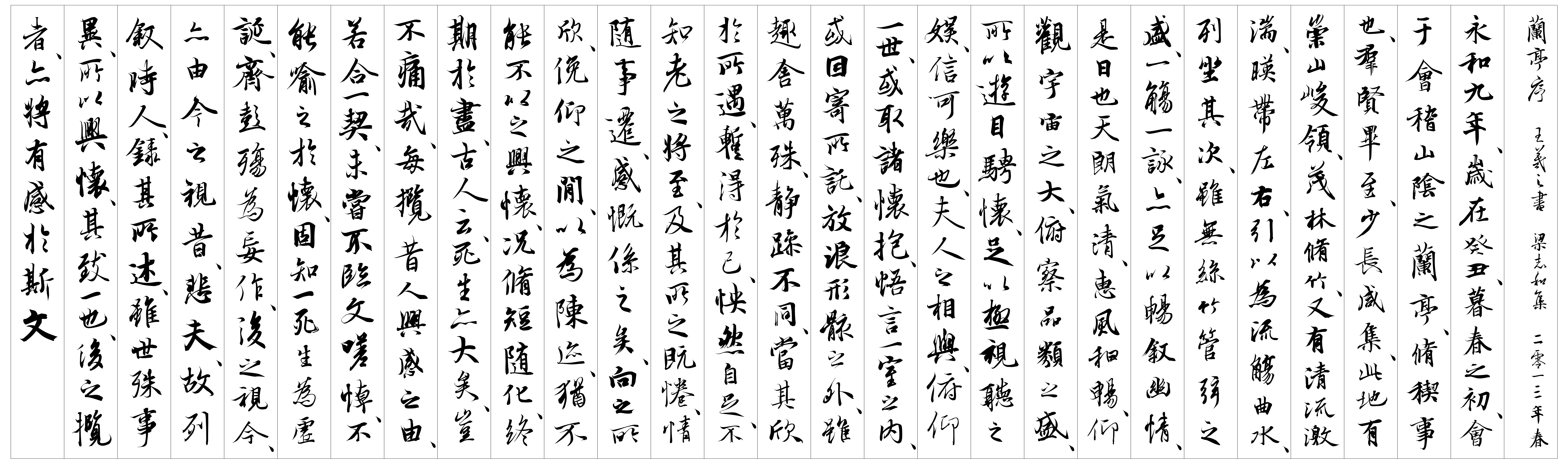 集馮承素摹本